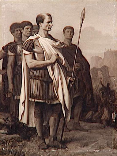 Jules César entouré de ses généraux